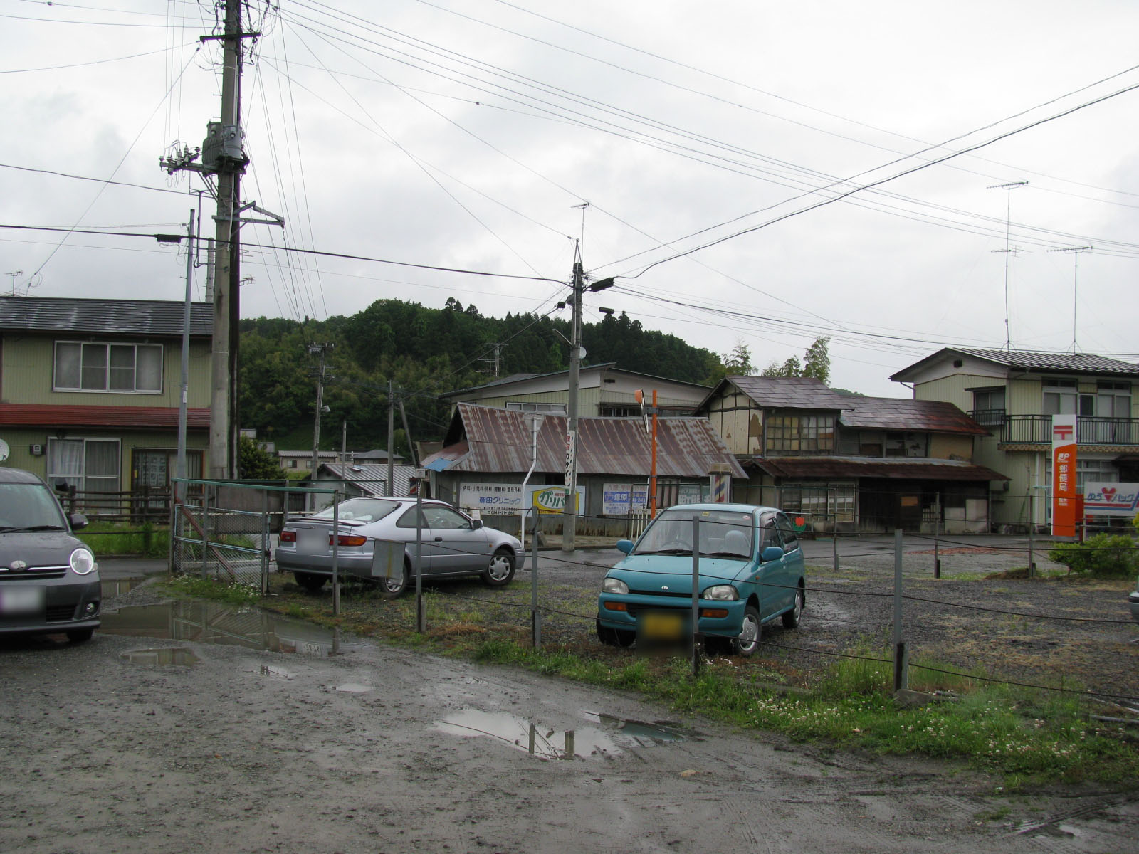 磐越東線舞木駅